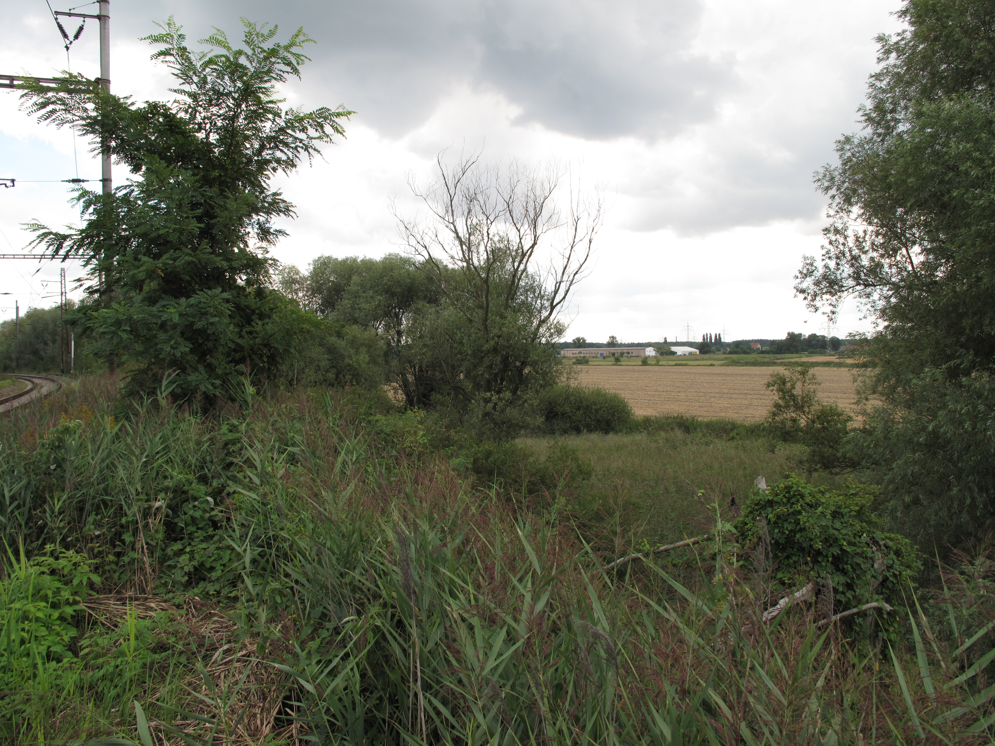 Přírodní rezervace Všetatská černava. Okres Mělník, Česká republika.